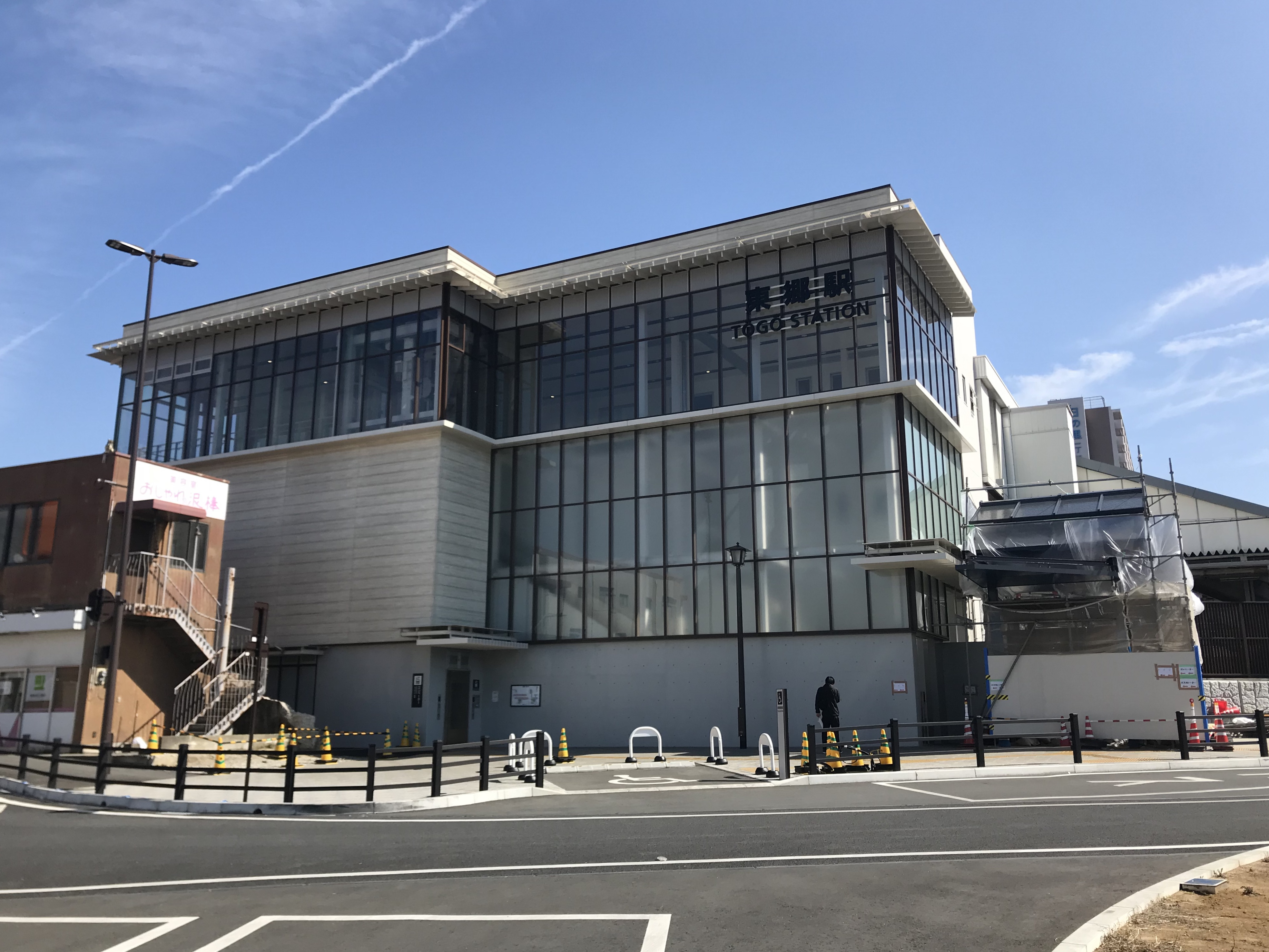 東郷駅の駅舎